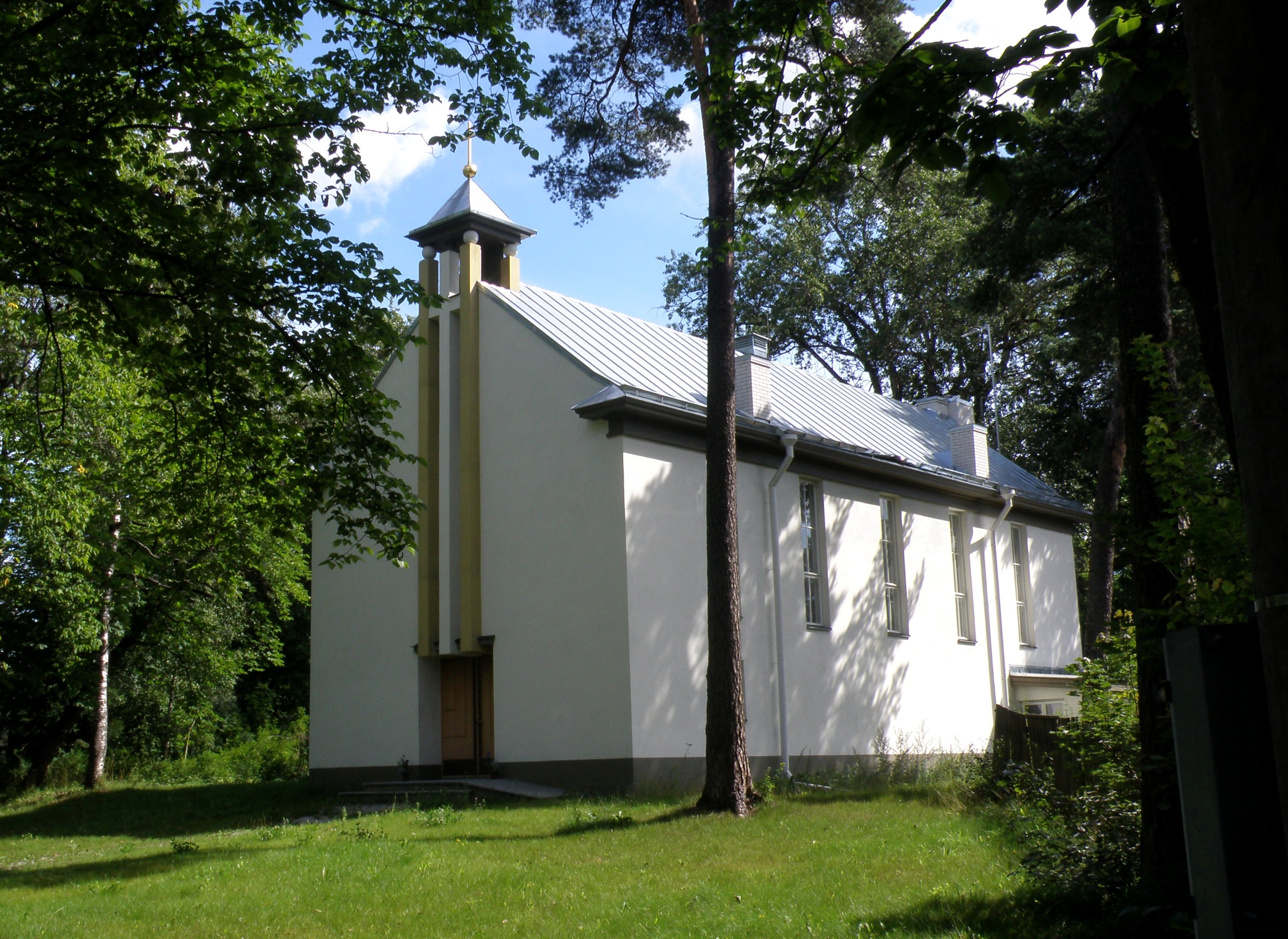 Nõmme Saksa Lunastaja koguduse palvela